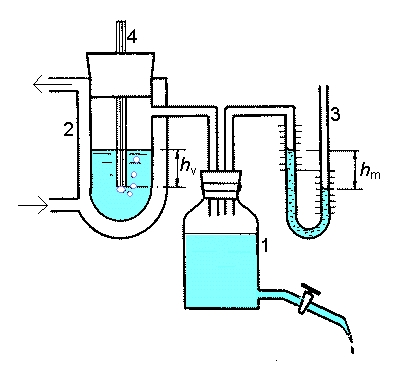 A buboréknyomásos felületi feszültség mérési módszerhez a készülék összeállítási vázlata